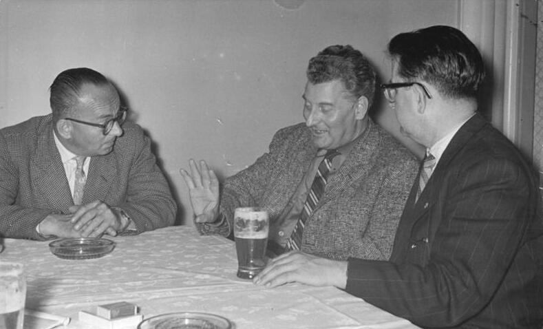 Zentralbild Hochneder 10.6.1960 2. Arbeiterfestspiele des FDGB. "Abu Hassan" von einem Arbeitertheater aufgeführt. "Abu Hassan", eine heitere Oper von Carl Maria von Weber wurde als Gastspiel des Arbeitertheaters Dresden-Niedersedlitz am 7.6.1960 im Festspielort Aue aufgeführt. Diese Operninszenierung ist die erste, die ein Arbeitertheater in Zusammenarbeit mit Berufskünstlern einstudiert hat. UBz: Der Komponist Jean Kurt Forest, der sich die Aufführung angesehen hatte, spricht mit dem Leiter der Arbeiteroper vom Sachsenwerk, Willi Hera (rechts) und (links) dem Cellisten Werner Renner (Schweißer im Sachsenwerk).